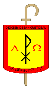 Escudo de la Diócesis de San Cristóbal. Estado Táchira. Venezuela